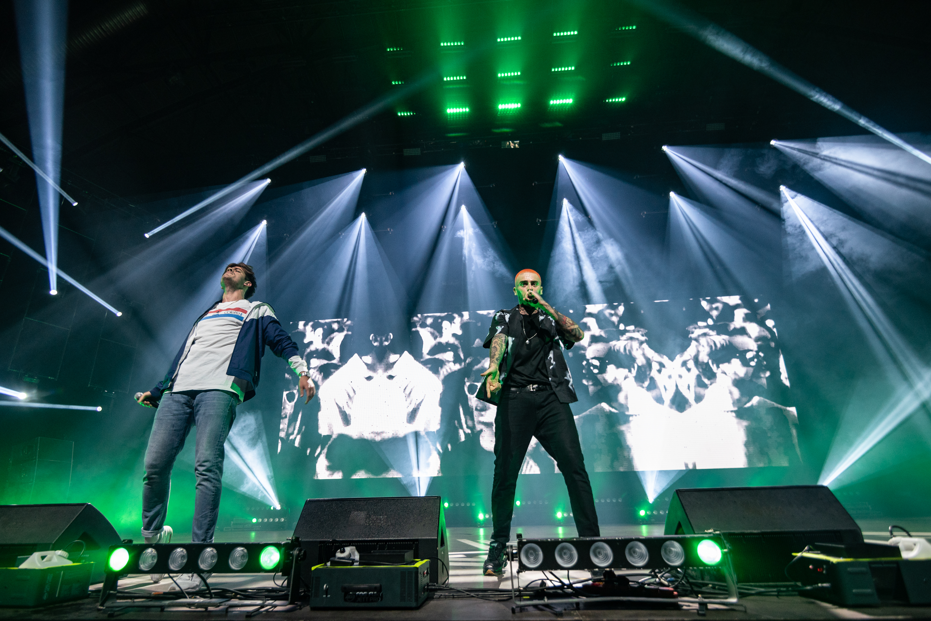 Taconafide podczas koncertu w Warszawie w ramach trasy Ekodiesel Tour promującej debiutancki album Soma 0,5 mg.